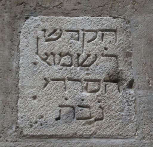 הקדש ר שמואל הסרדי ברצלונה